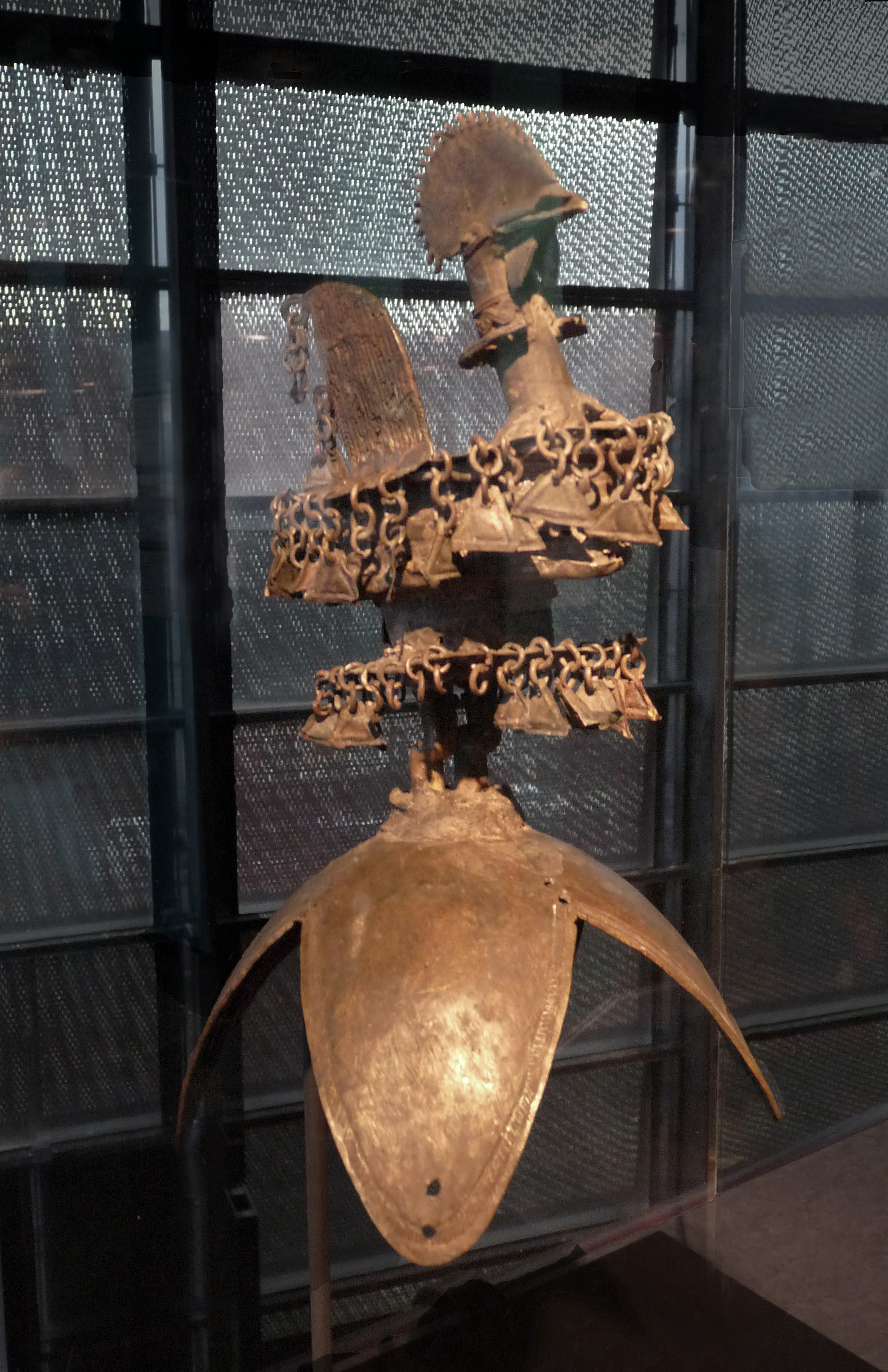 Egbira : masque-cimier avec un coq. Deuxième moitié du XIXe s. Alliage cuivreux. Indianapolis Museum of Art. Exposition Nigeria. Arts de la vallée de la Bénoué au musée du quai Branly (Paris)